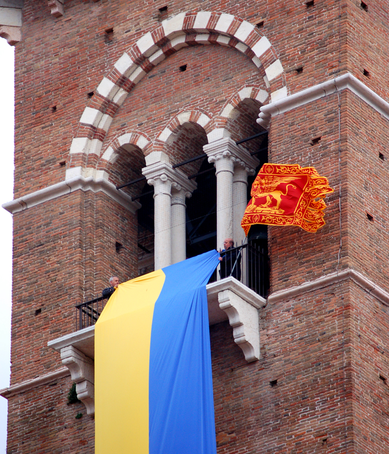 La torre dei Lamberti il giorno il cui si ricorda l'inizio delle Pasque Veronesi